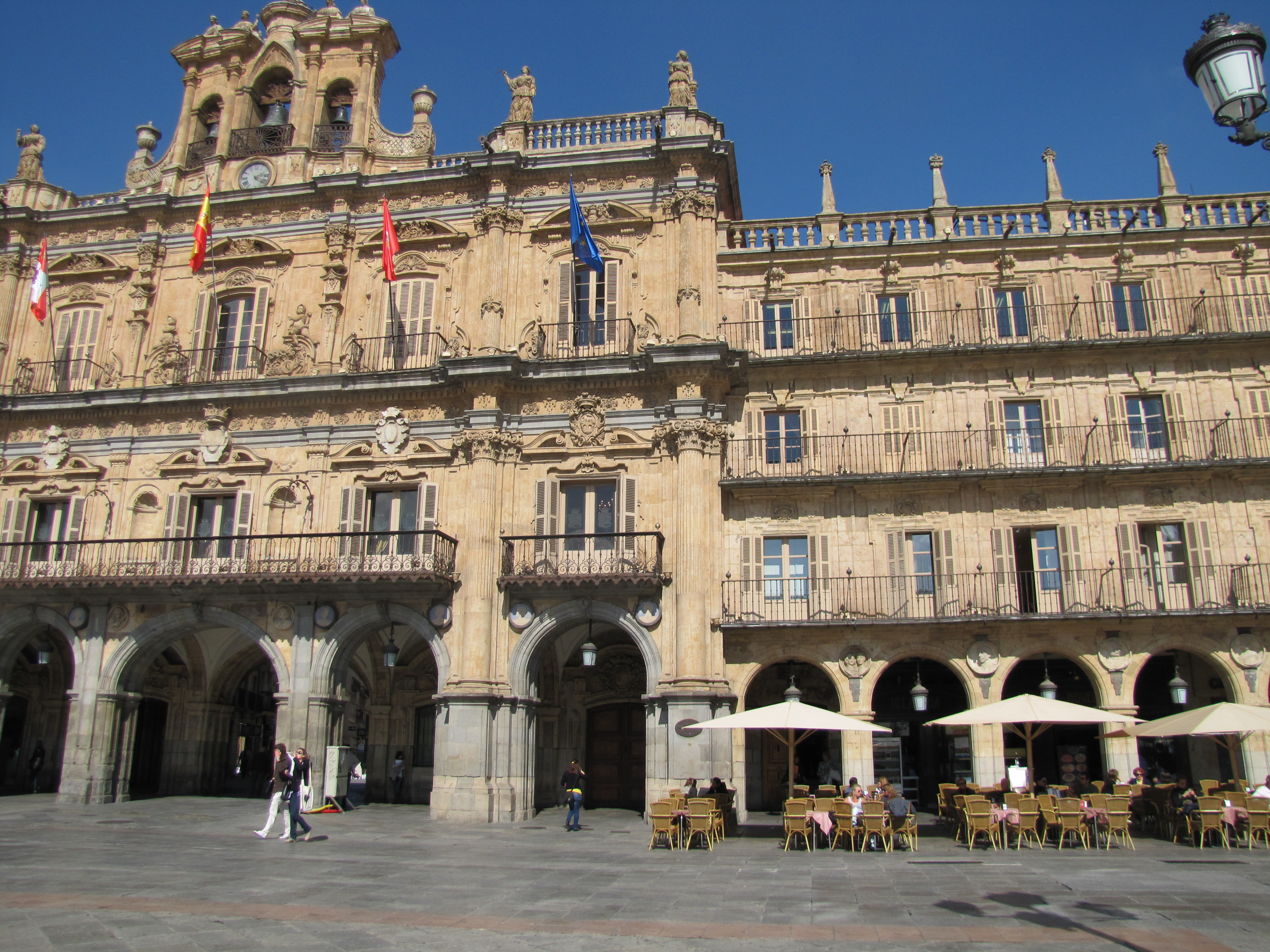 Fotografía de la Fachada Principal de la Plaza Mayor de Salamanca, terminada en 1755, donde actualmente se encuentra el Ayuntamiento y a su derecha el Café Novelty, fundado en 1905.